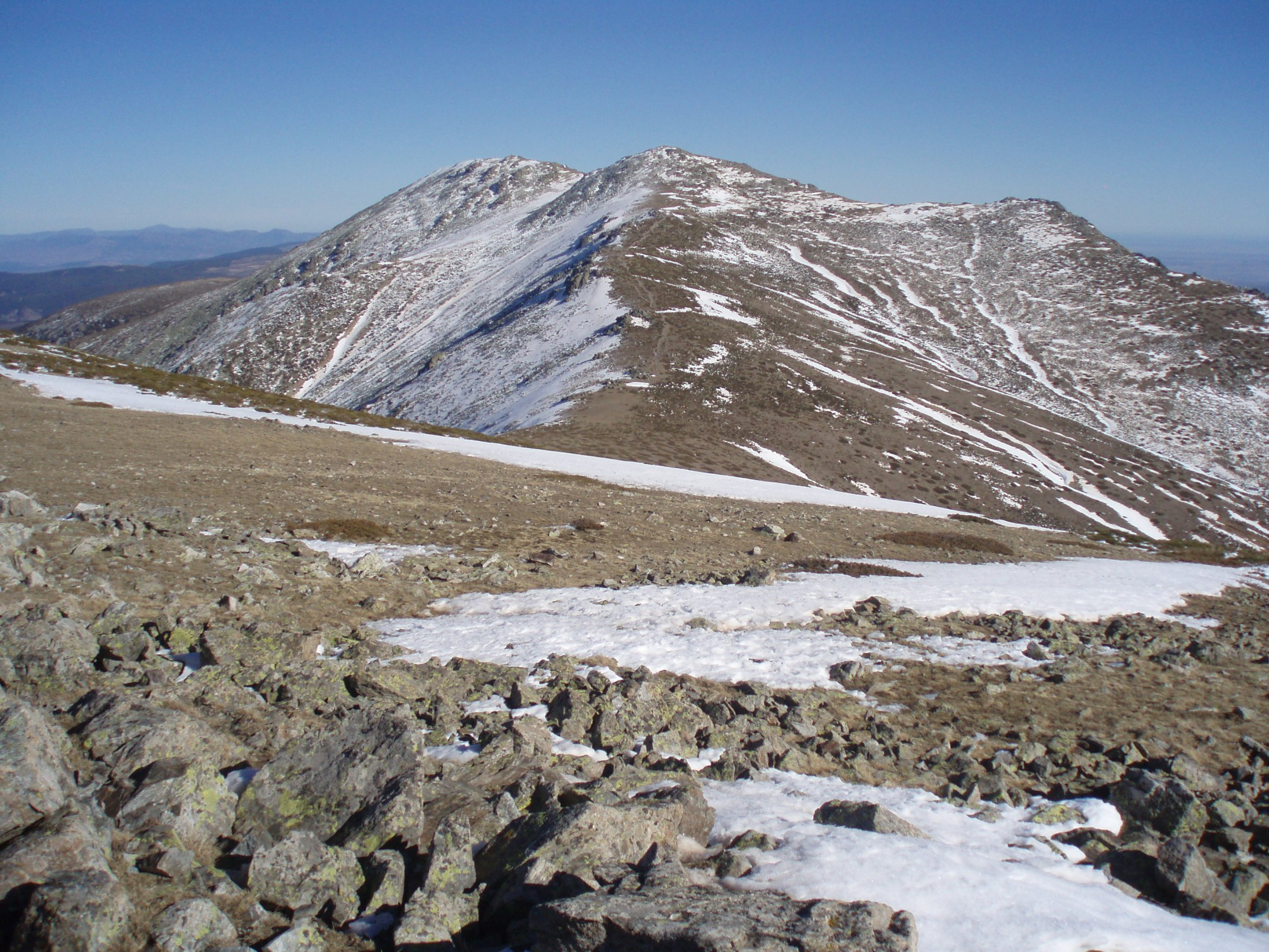 Cimas de las Cabezas de Hierro vistas desde la cumbre del Cerro de Valdemartín (Sierra de Guadarrama, España).